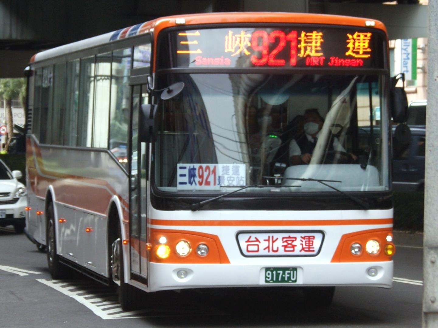 臺北客運大宇BC211MA大客車917-FU，行駛新北市市區公車921線。